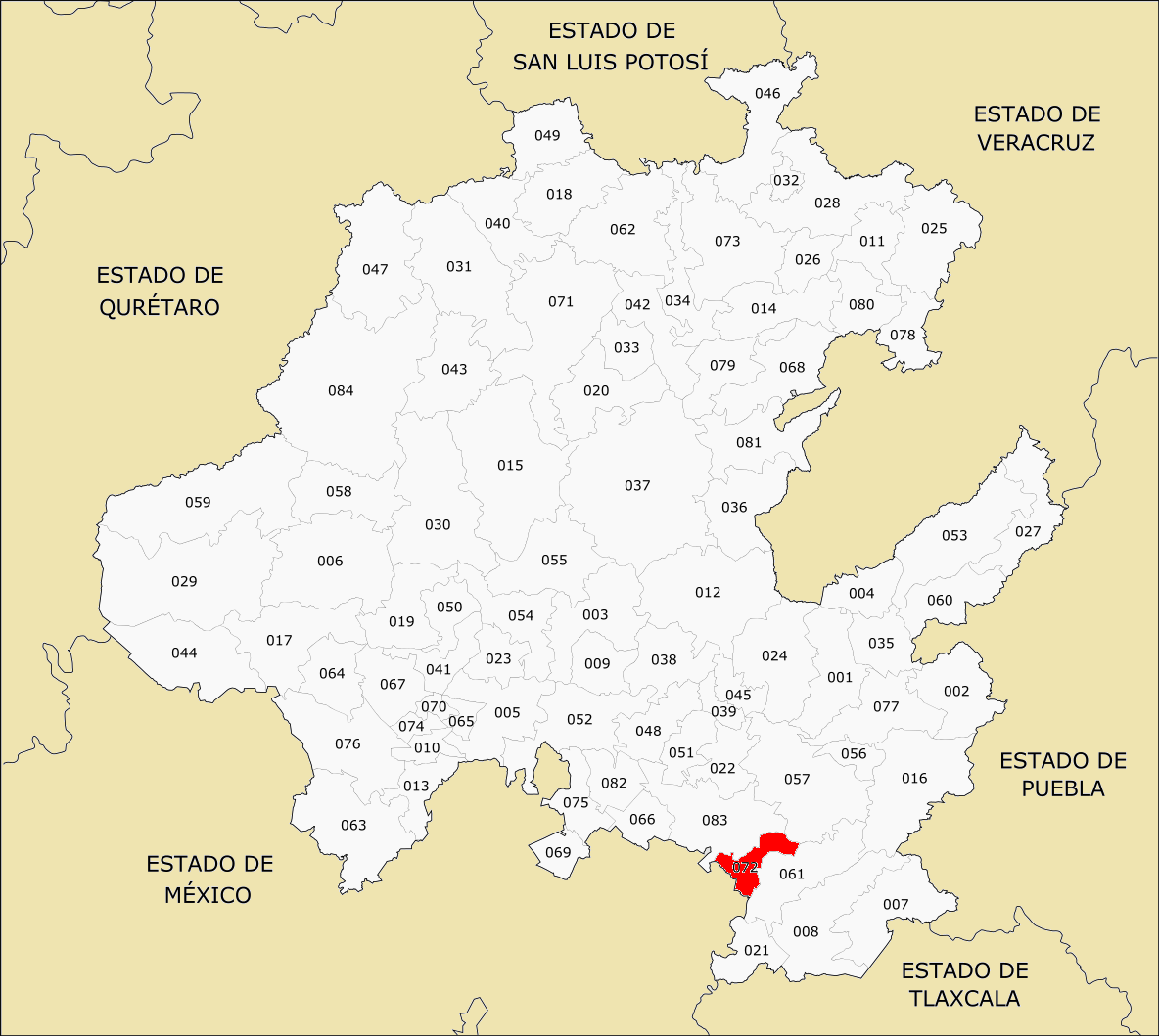 Municipios de Hidalgo